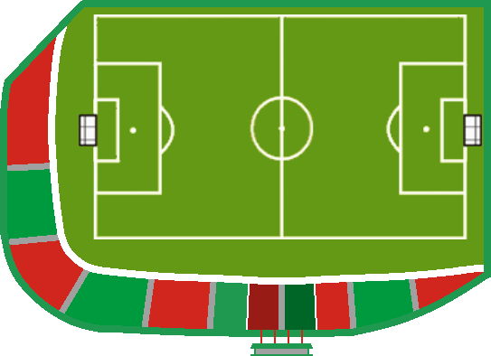 Imagen no oficial que representa el estadio Olímpico